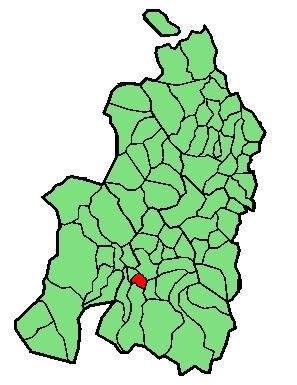 aipaturiko udalerriaren kokapena Nafarroa Beherean